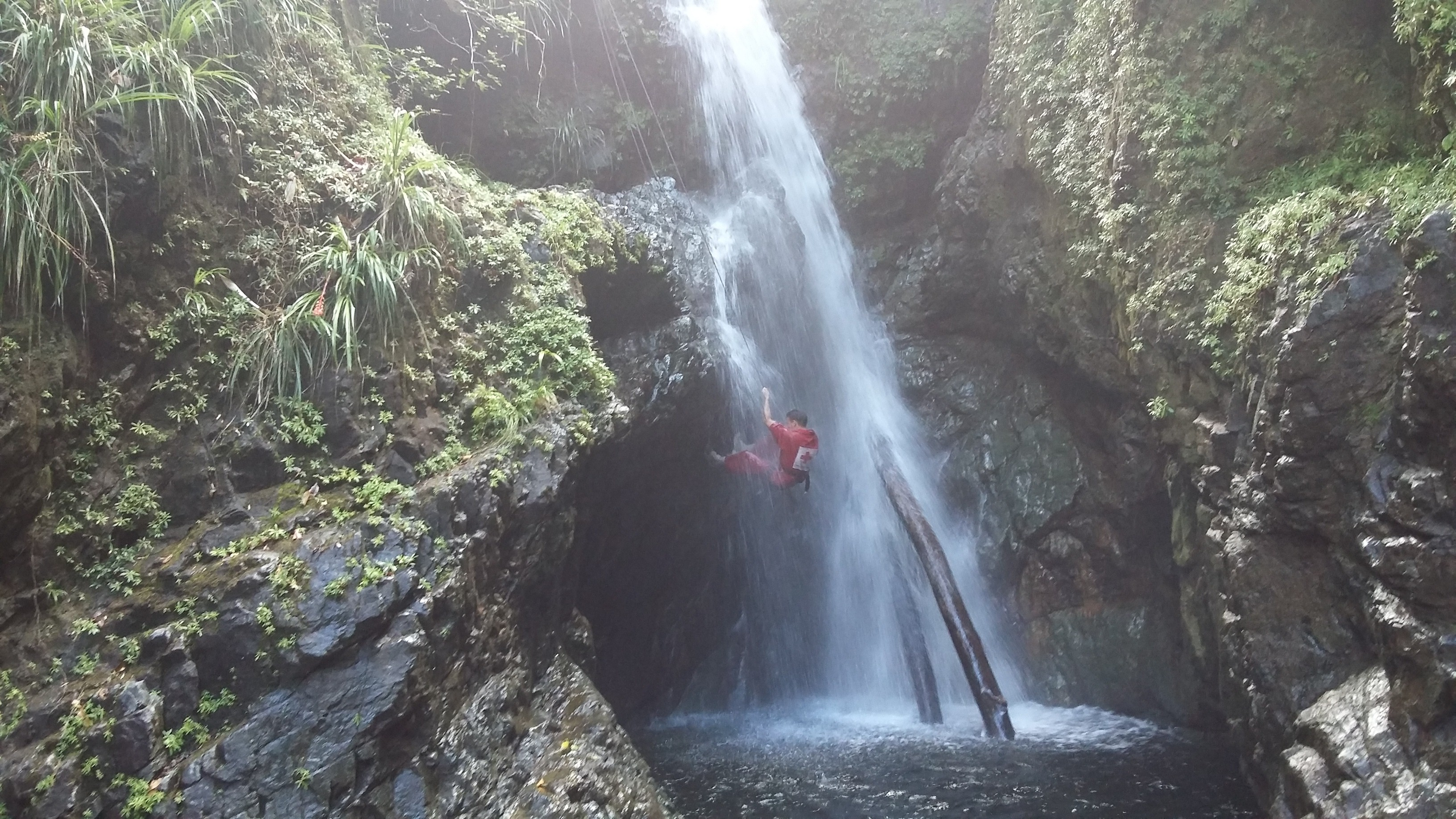 CANYONING EN CUBA-BARACOA.